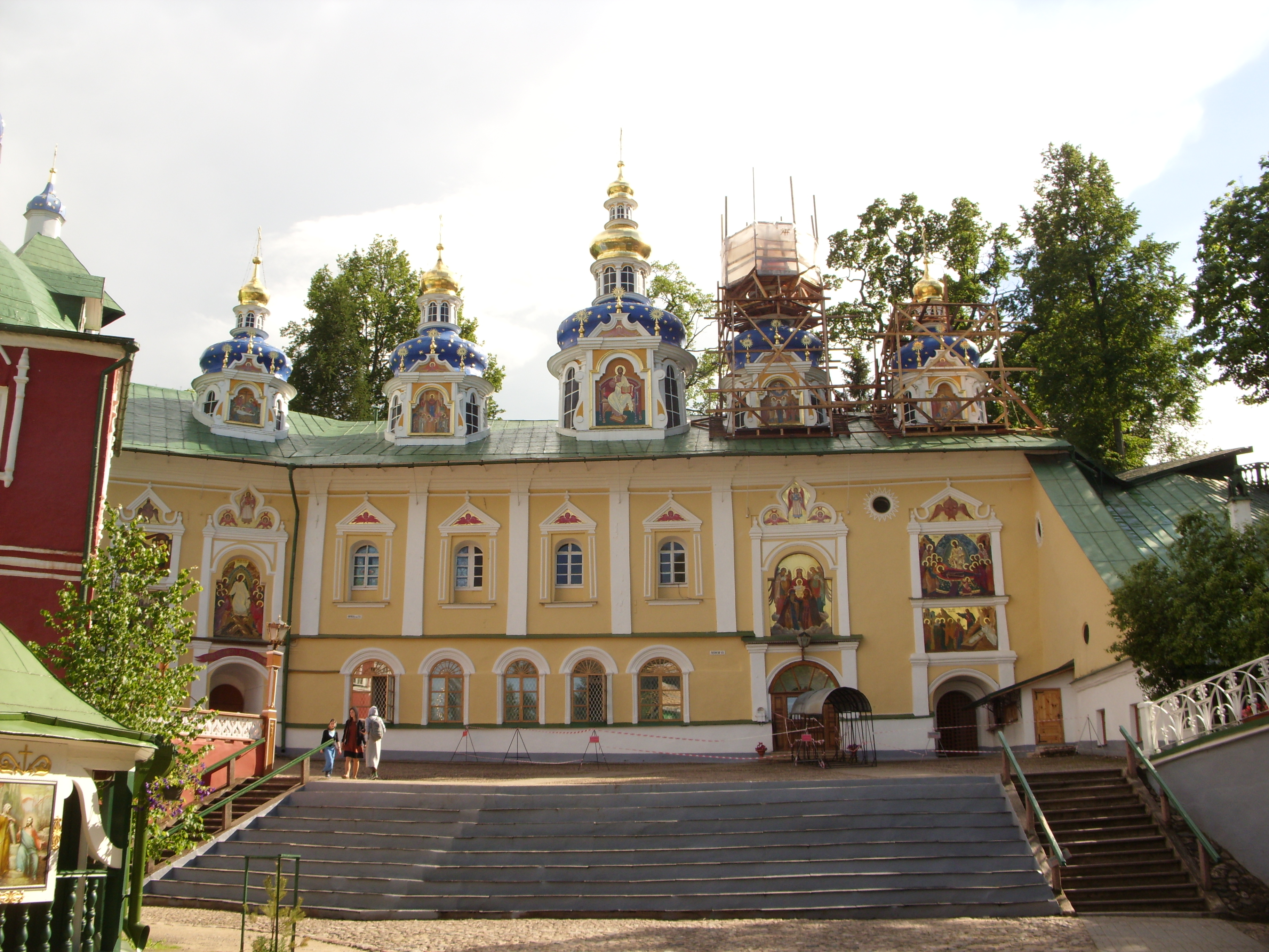 Pechory. Uspenskij sobor